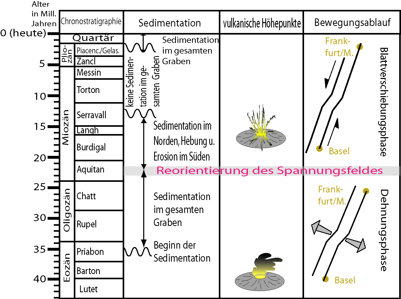 Abriss der oberrheinischen Riftenwicklung